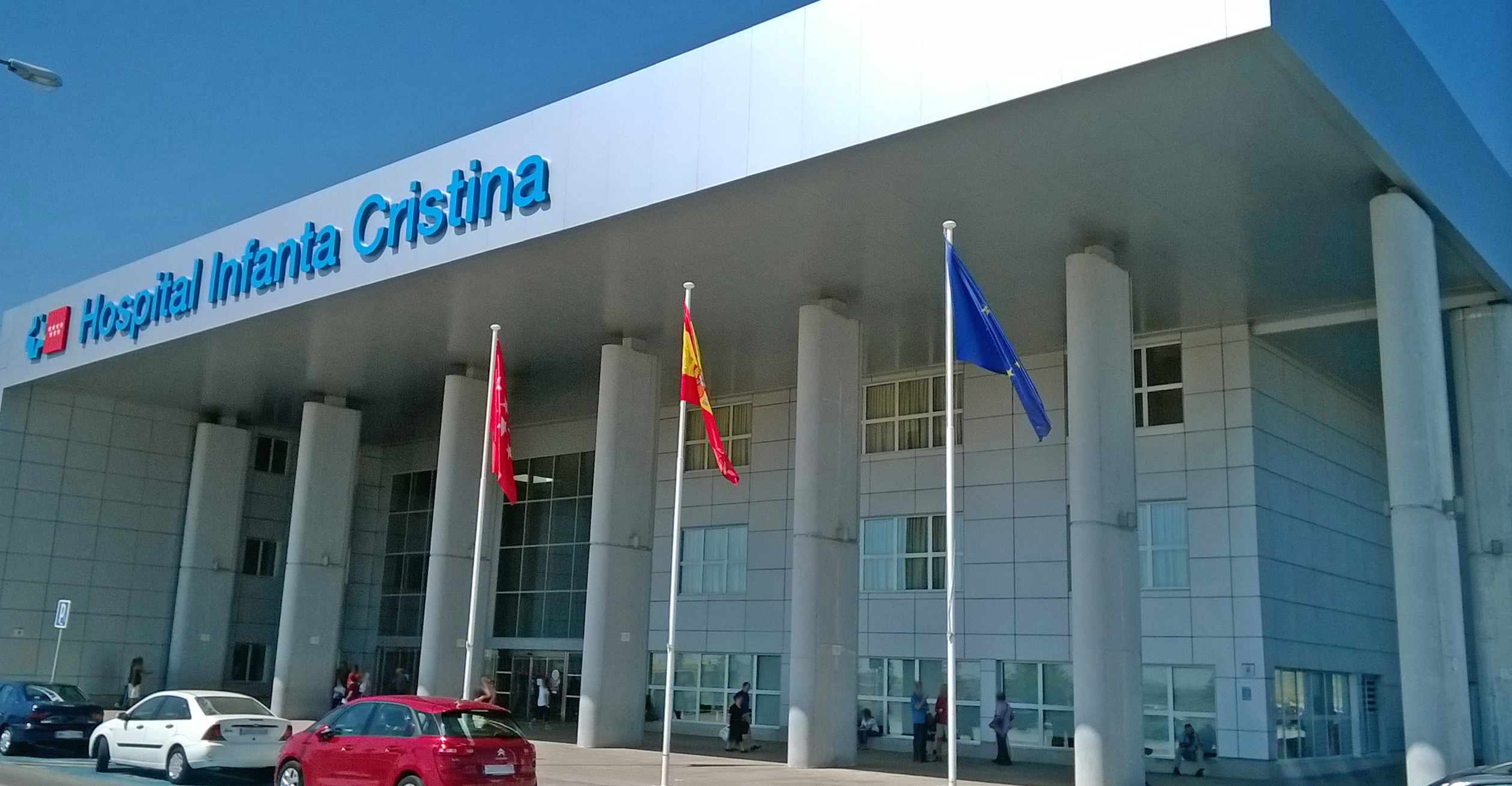 Hospital de Parla fue bautizado como Infanta Cristina, aunque en un principio se iba a llamar 9 de junio.